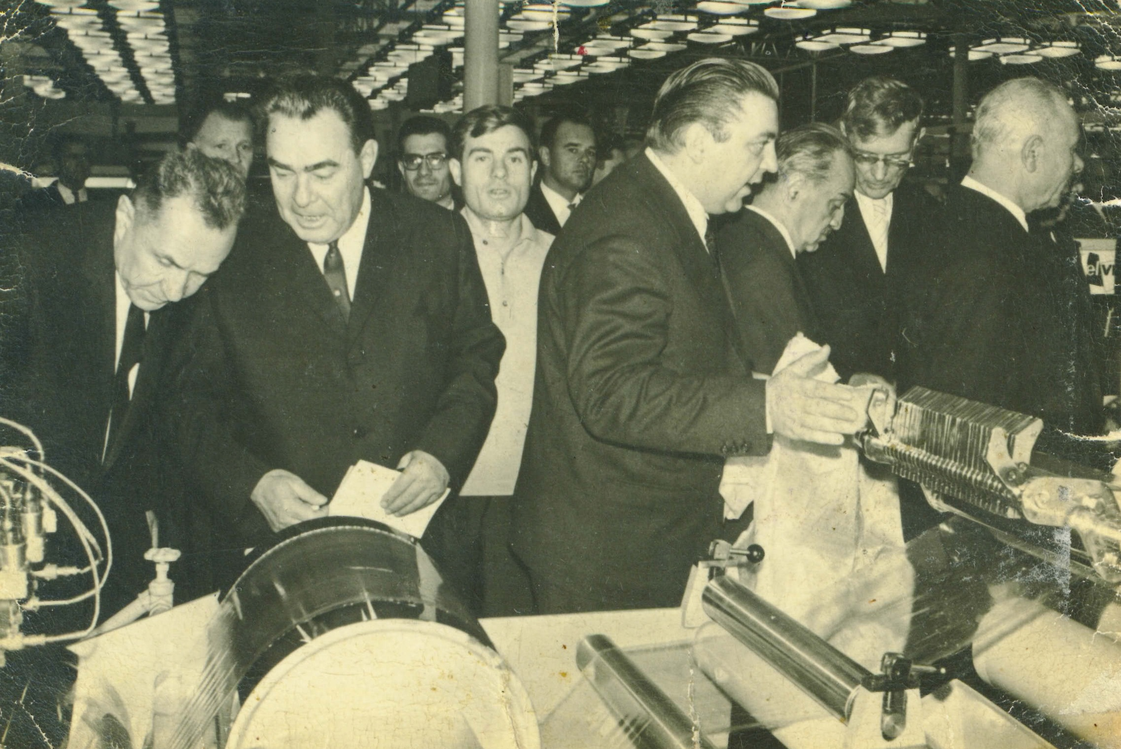 Fiera Interplastica a Mosca 1965, in questa foto compaiono Marco e Dino Terragni (quarto da sinistra) che illustrano al segretario generale del Partito comunista dell'Unione Sovietica Leonid Brezhnev le macchine prodotte e sviluppate da Covema srl di Milano